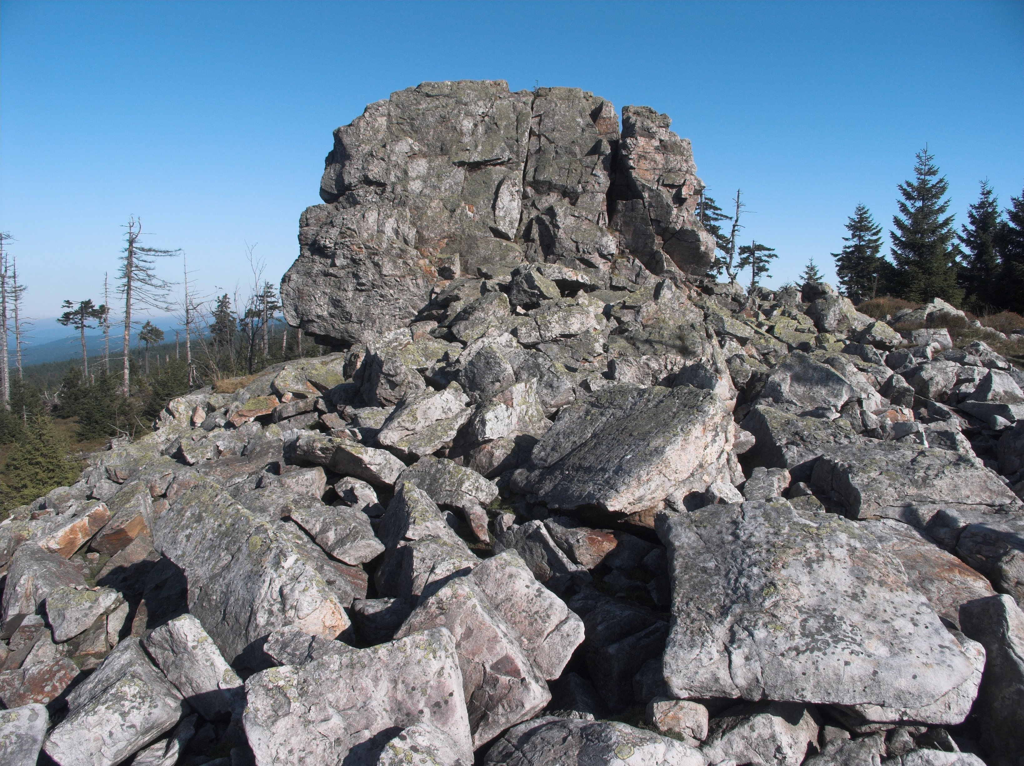 Selbst photographiert am 15.10.06